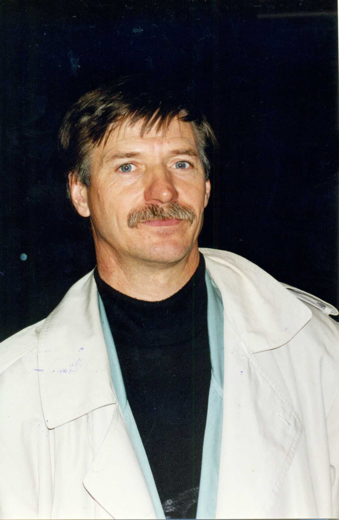 На фестивале в Каннах (Франция)